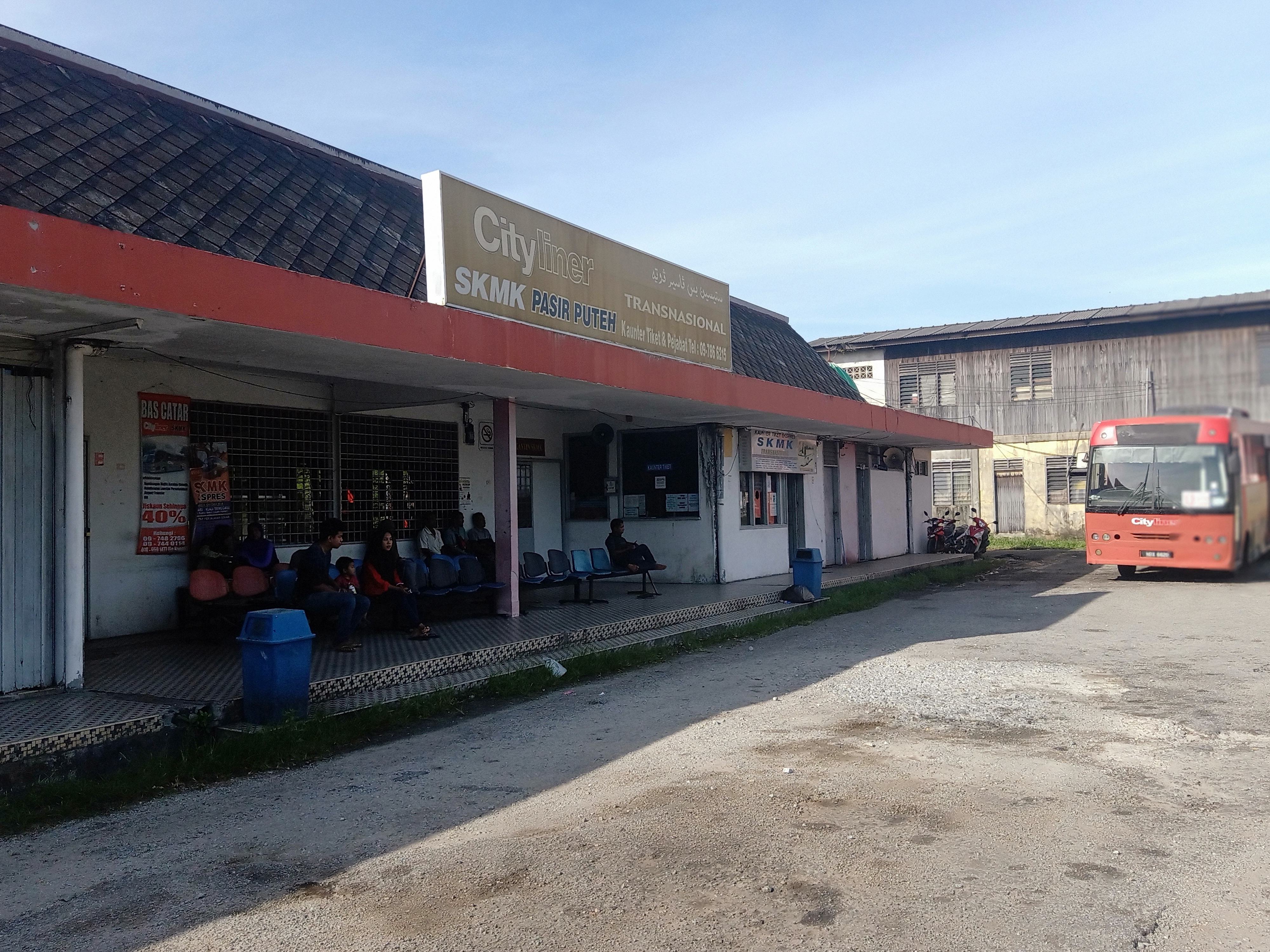 Stesen bas lama di pasir puteh yang masih digunakan